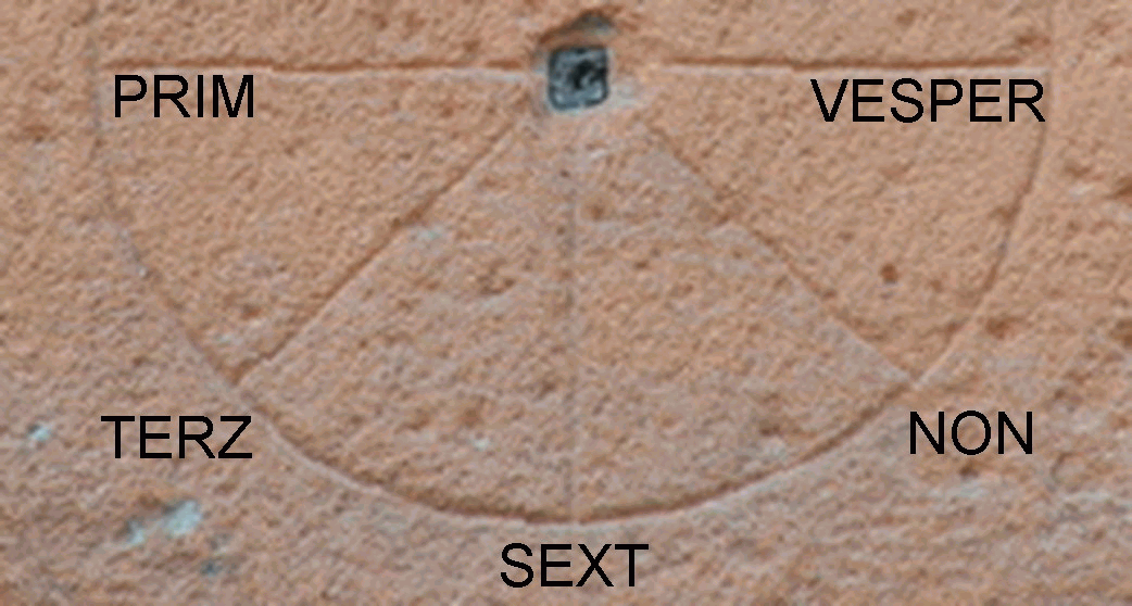 kanoniale Sonnenuhr, ältere Variante (NON am Nachmittag)